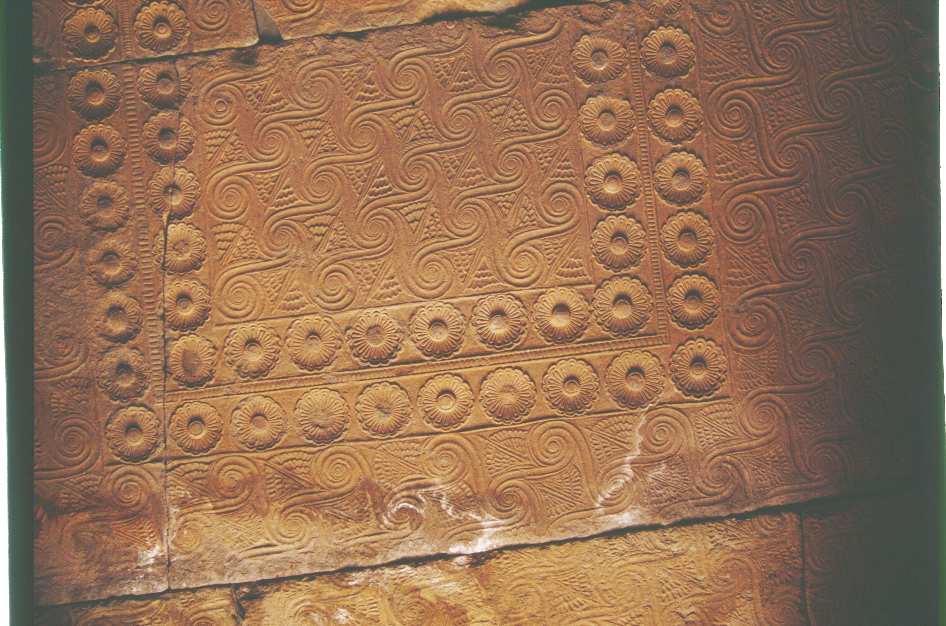 Kuppelgrab in Orchomenos: Decke